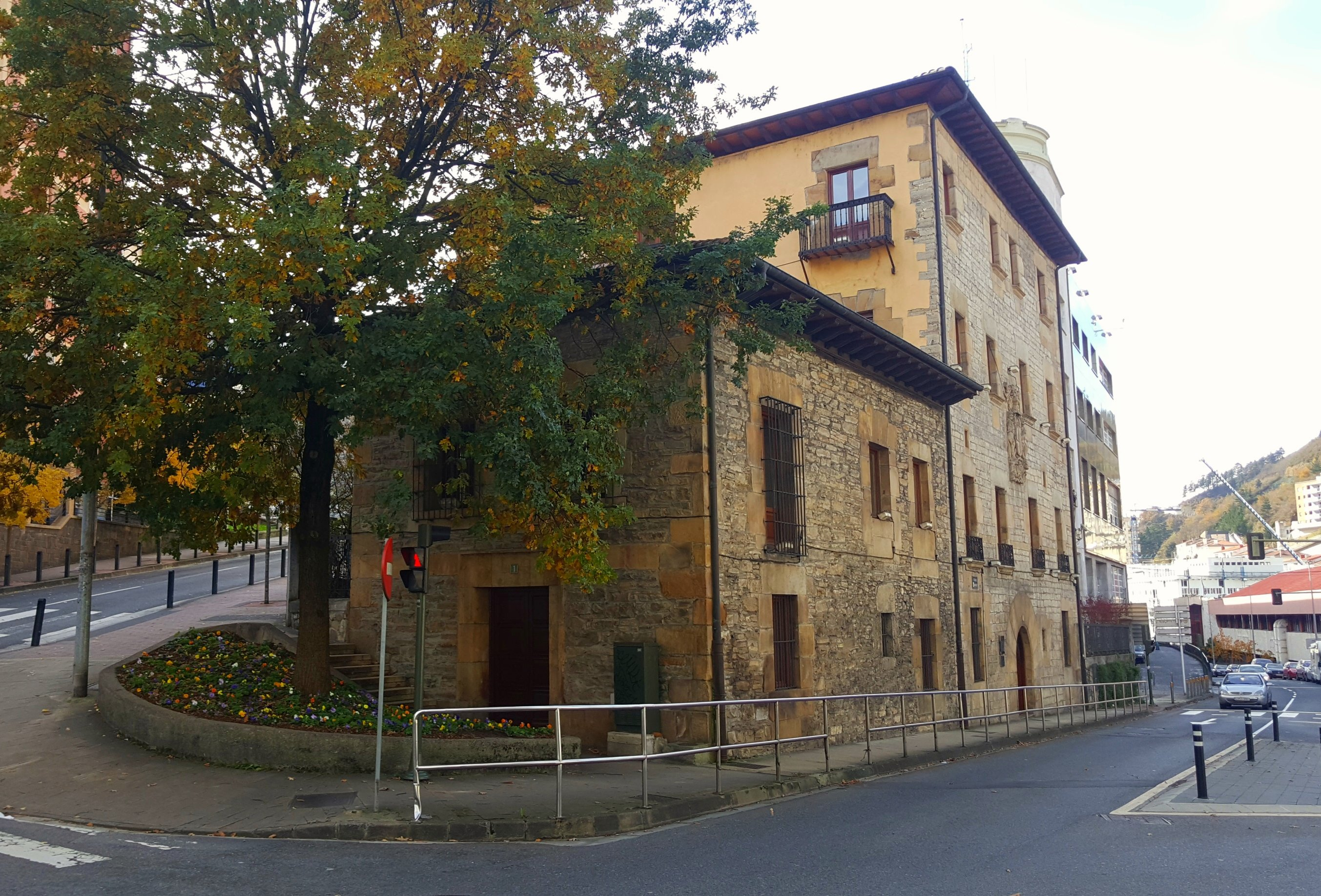 Eibarko jauregia, XVI. mendekoa